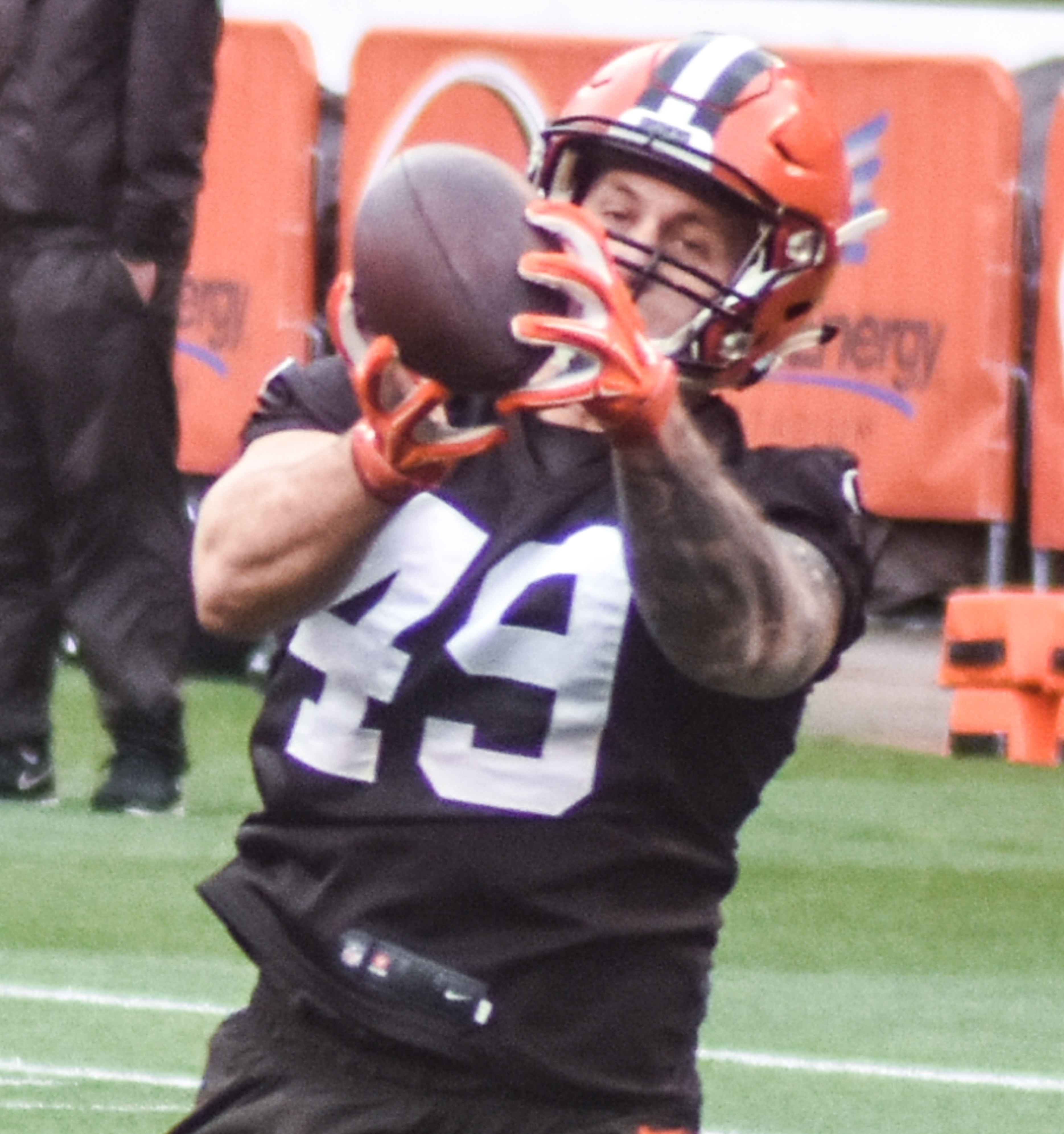 J.P. Holtz